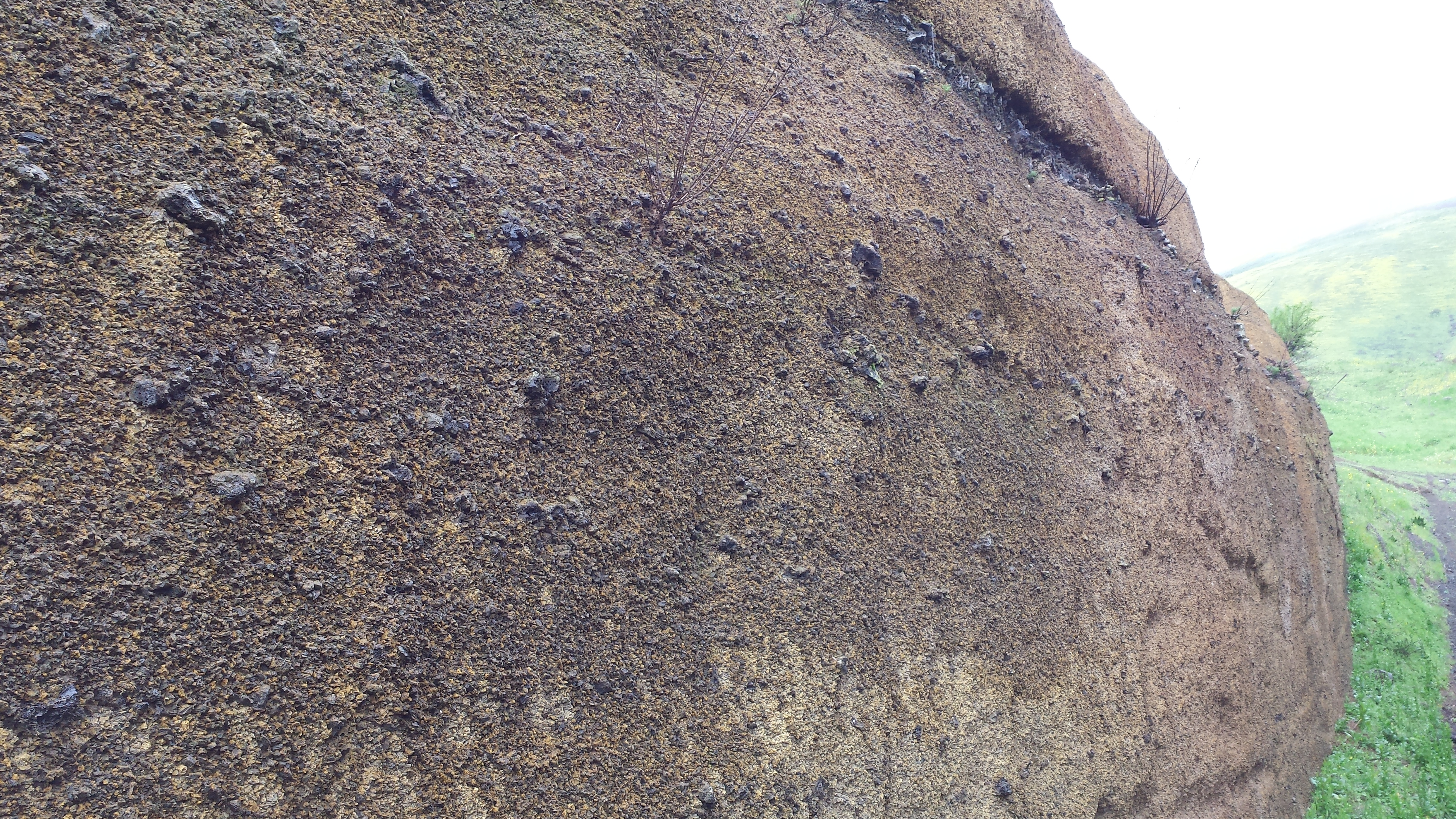 שכבת סקוריה שחורה דקת-גרגר שנחשפה בצד הדרום-מערבי של תל בנטל, רמת הגולן, ישראל